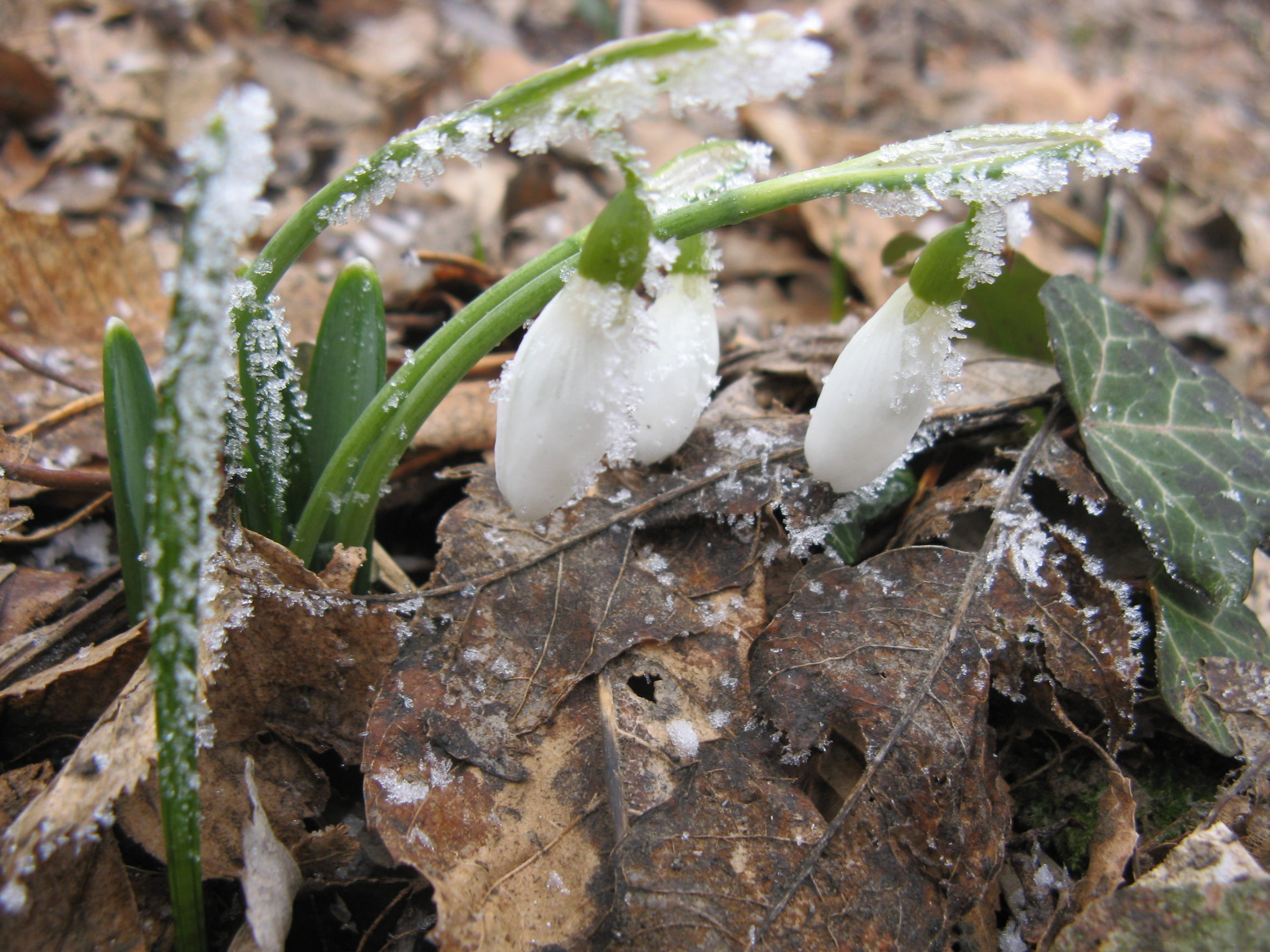 Урочище «Кубалач», Білогірський р-н, с. Мелихово, Пристепне л-во кв. 25,26,28,29,32,33.